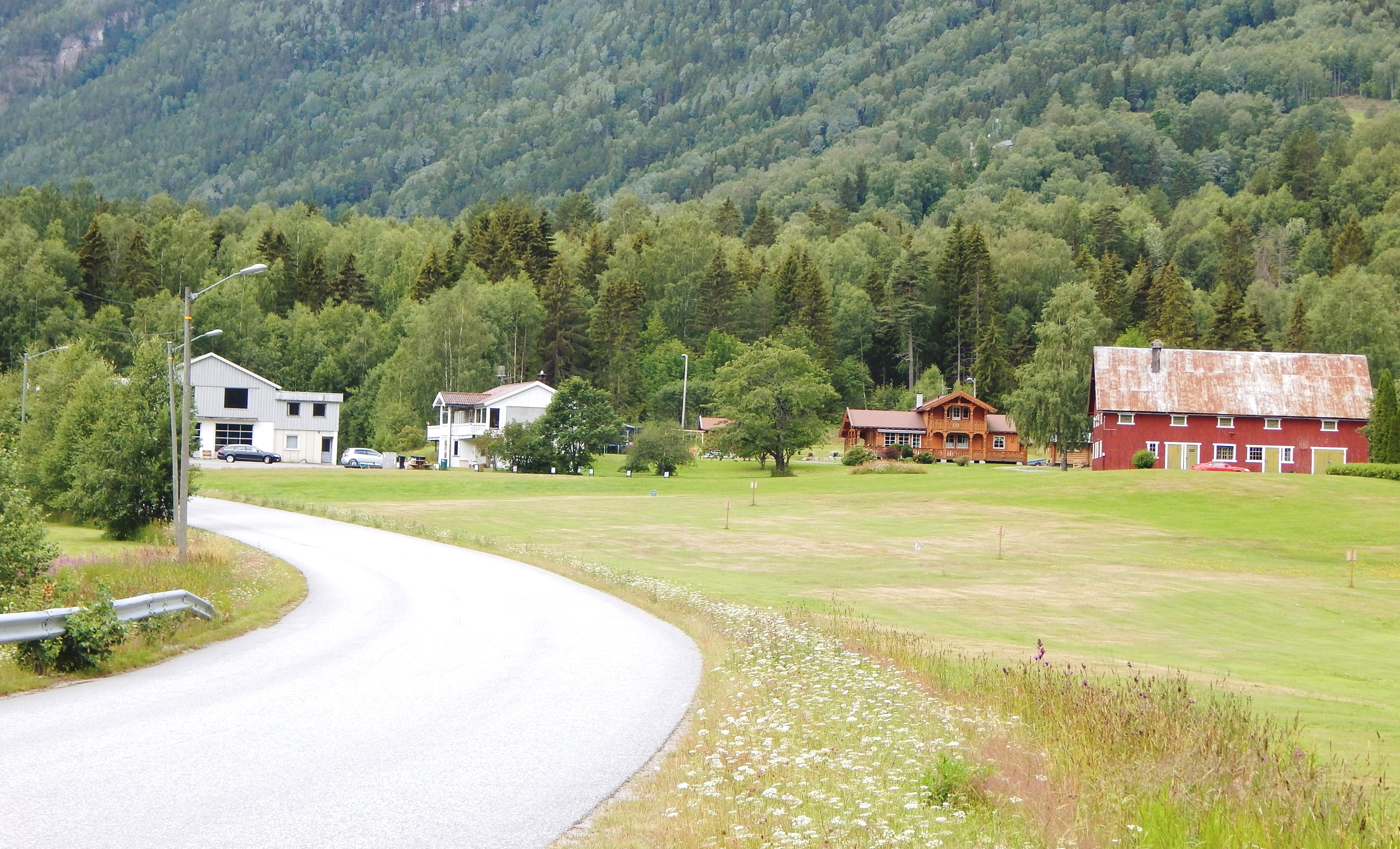 Mot Miland østfra